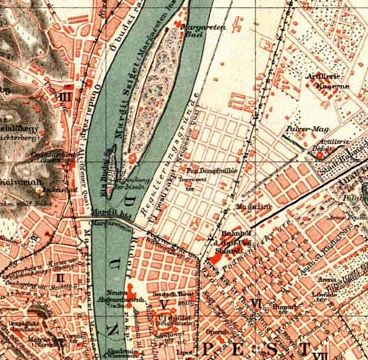 Budapest, Margit-sziget, 1888